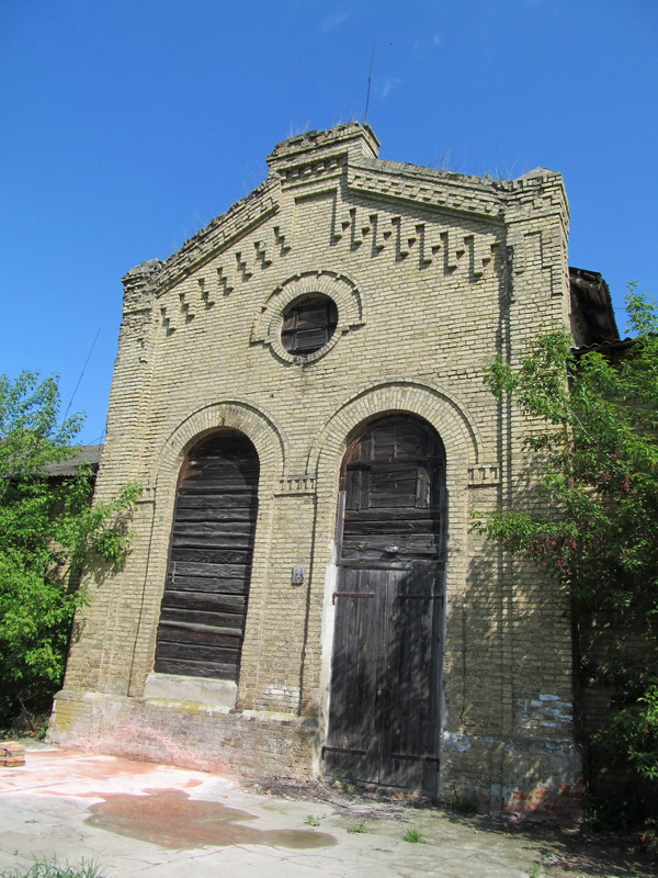 Старая Мыш. Спіртапрыёмнік і бровар